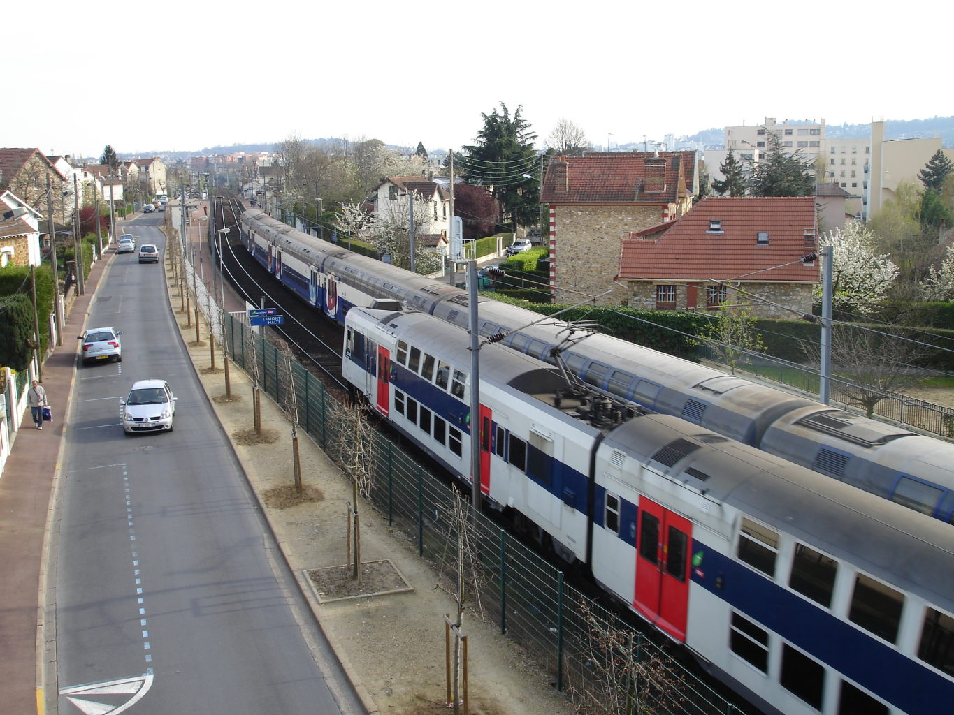 Gare d'Ermont - Halte à Ermont (Val-d'Oise), France